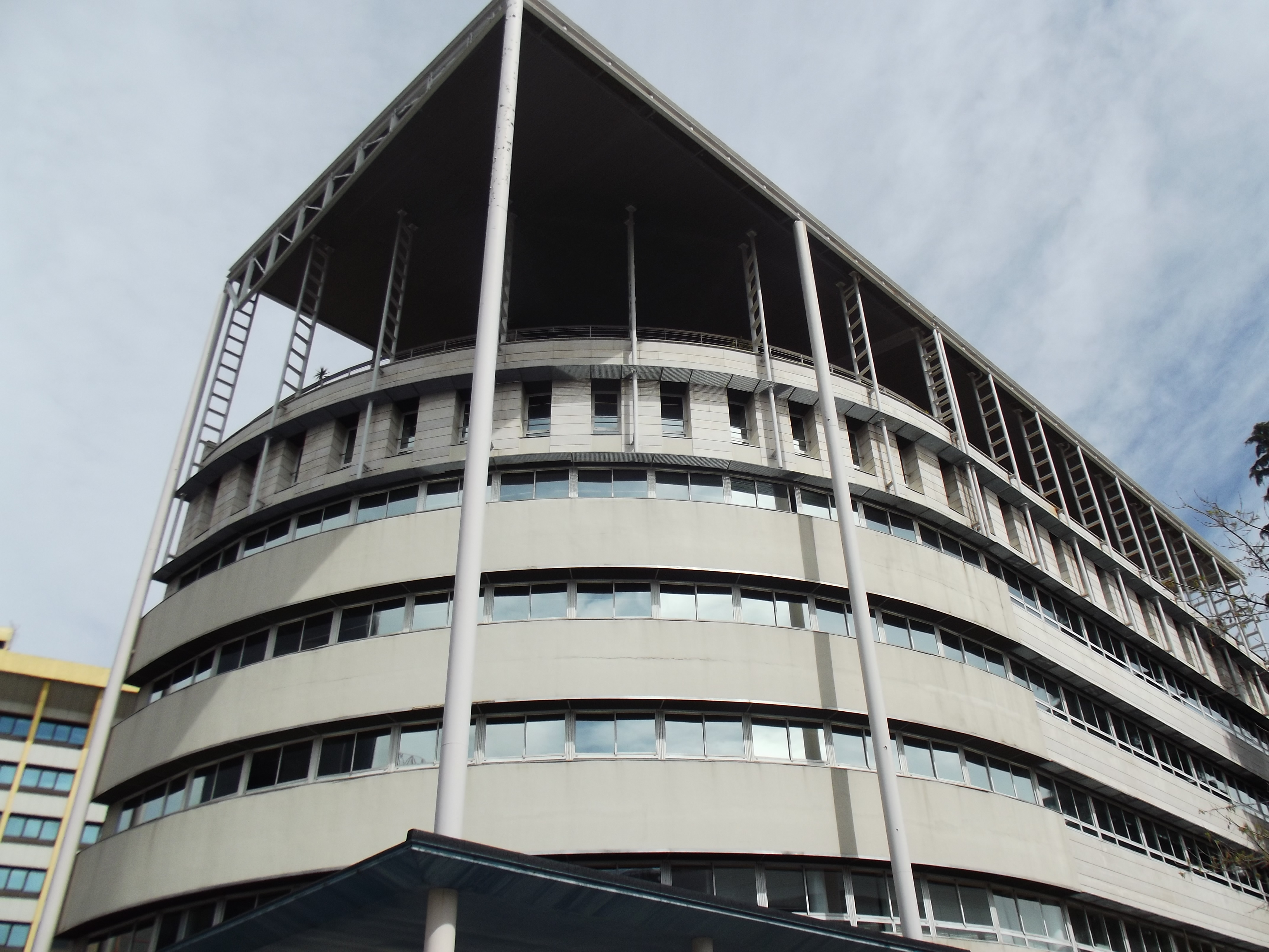 Edificio ENRESA, Calle Emilio Vargas 7. Colegio Oficial de Arquitectos de Madrid has entry F3.118 related to this item.